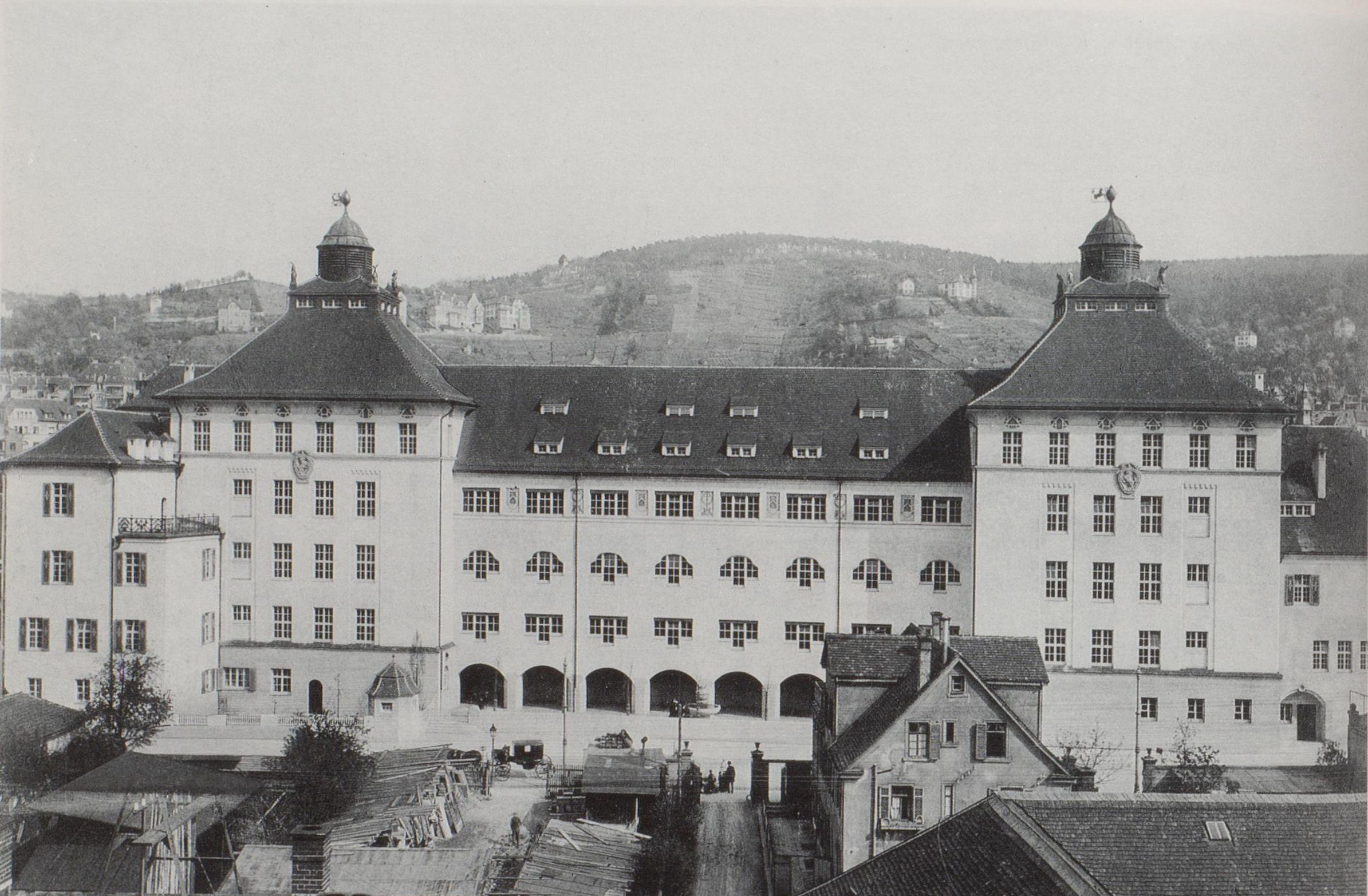 Heusteigschule, Stuttgart, Heusteigstraße 97, 1906. Architekt: Theodor Fischer.